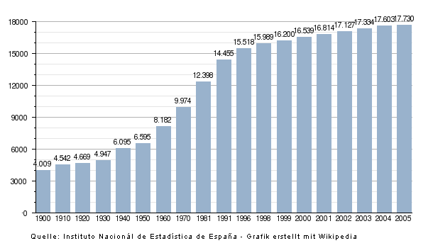 Grafik zur Bevölkerungsentwicklung Chipionas